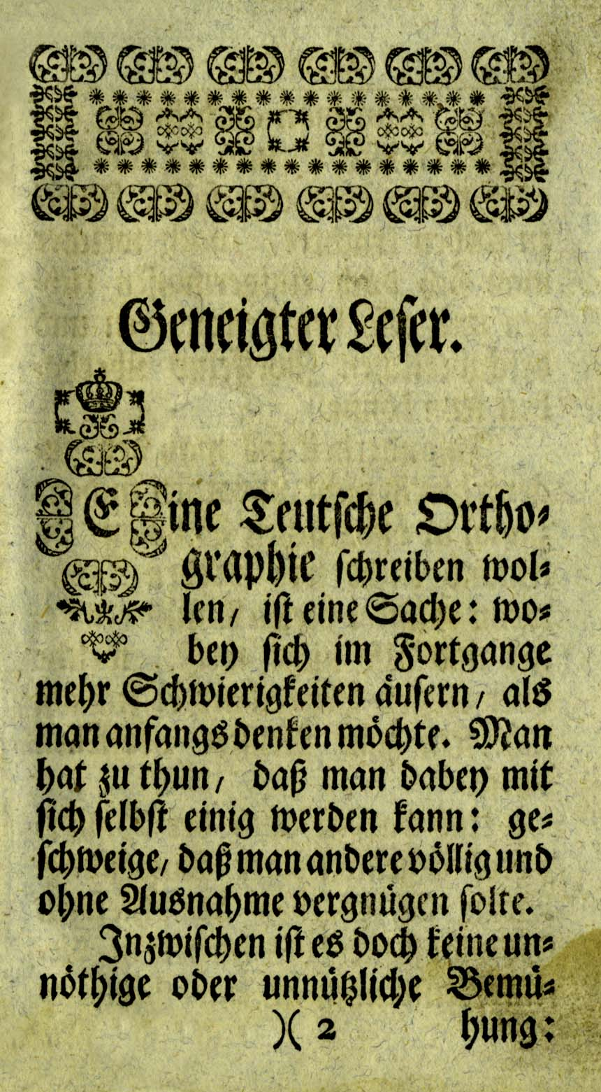 Hieronymus Freyer: Anweisung zur Teutschen Orthographie. Halle 1746. Vorwort 1